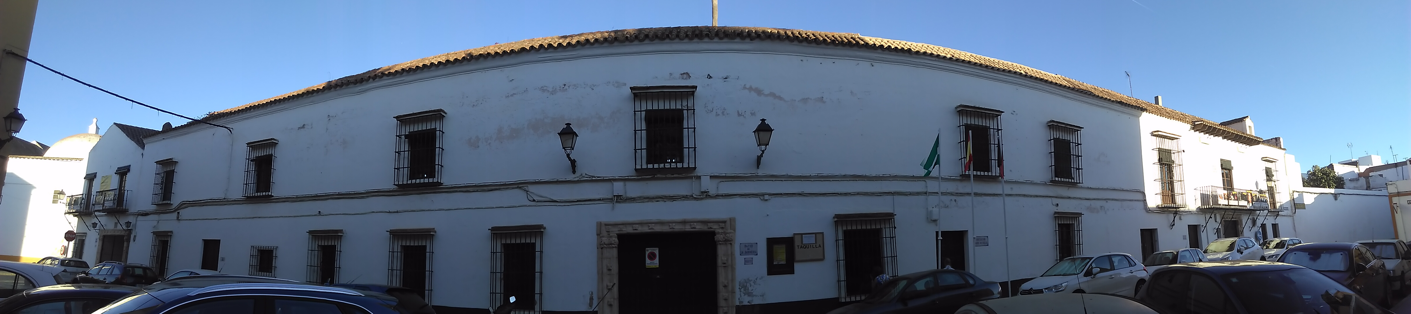 Panorámica de la fachada principal, destacan las características de arquitectura rural andaluza.